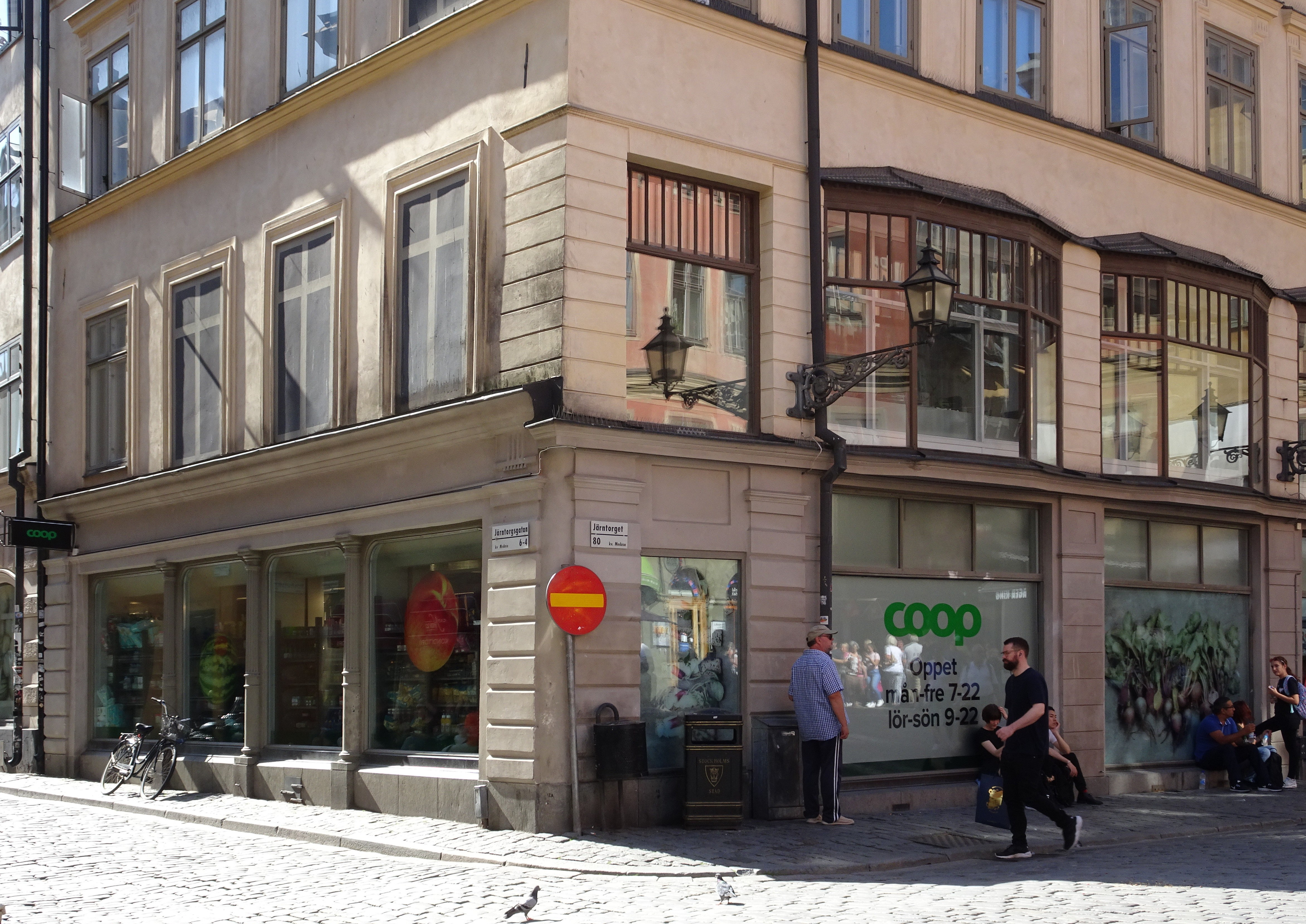 Hörnet Järntorget, Järntorgsgatan i kv. Medusa. Tidigare plats för värdshuset "Blå Örn"